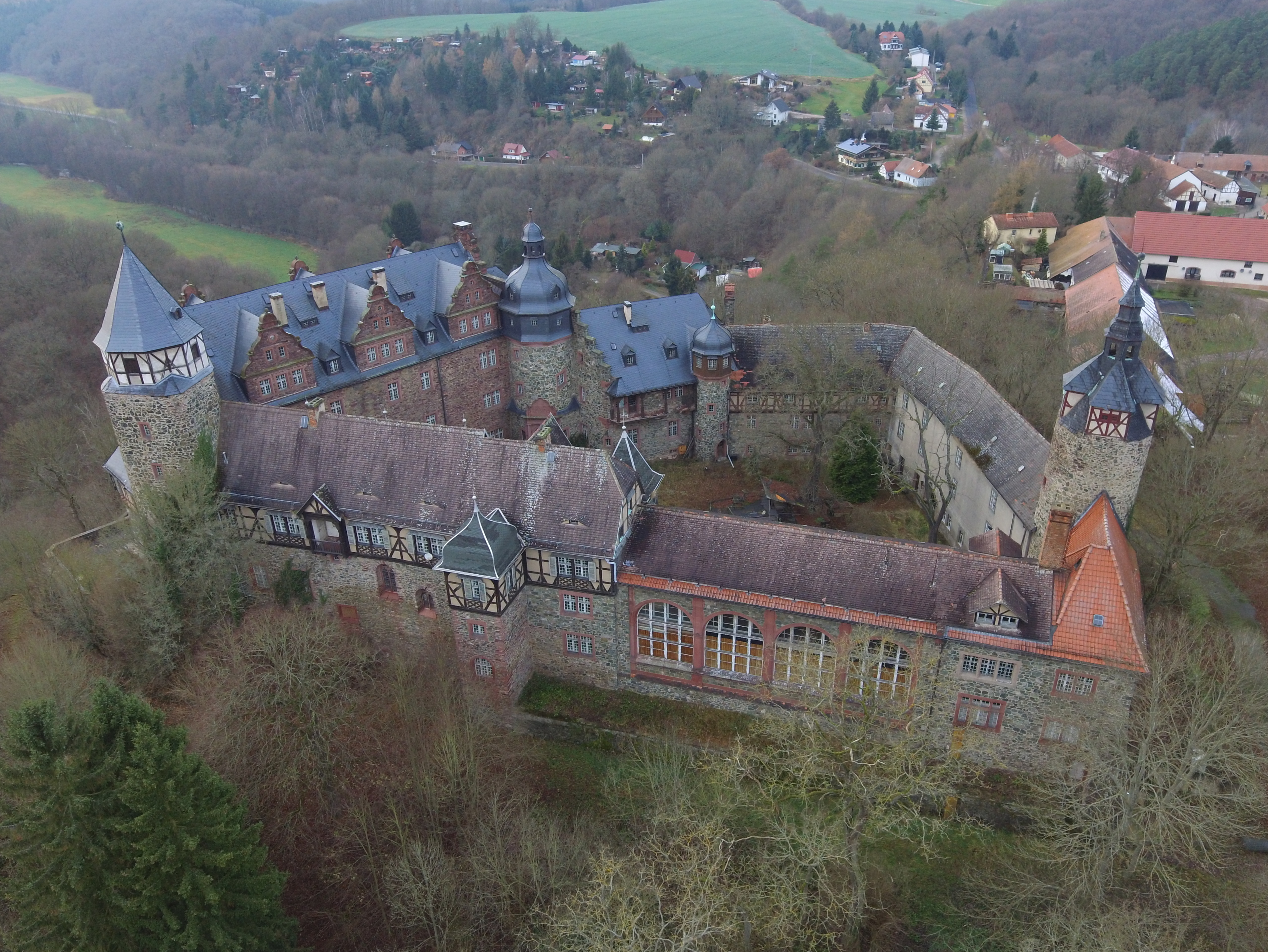 Rammelburg von Südosten per Luftbild